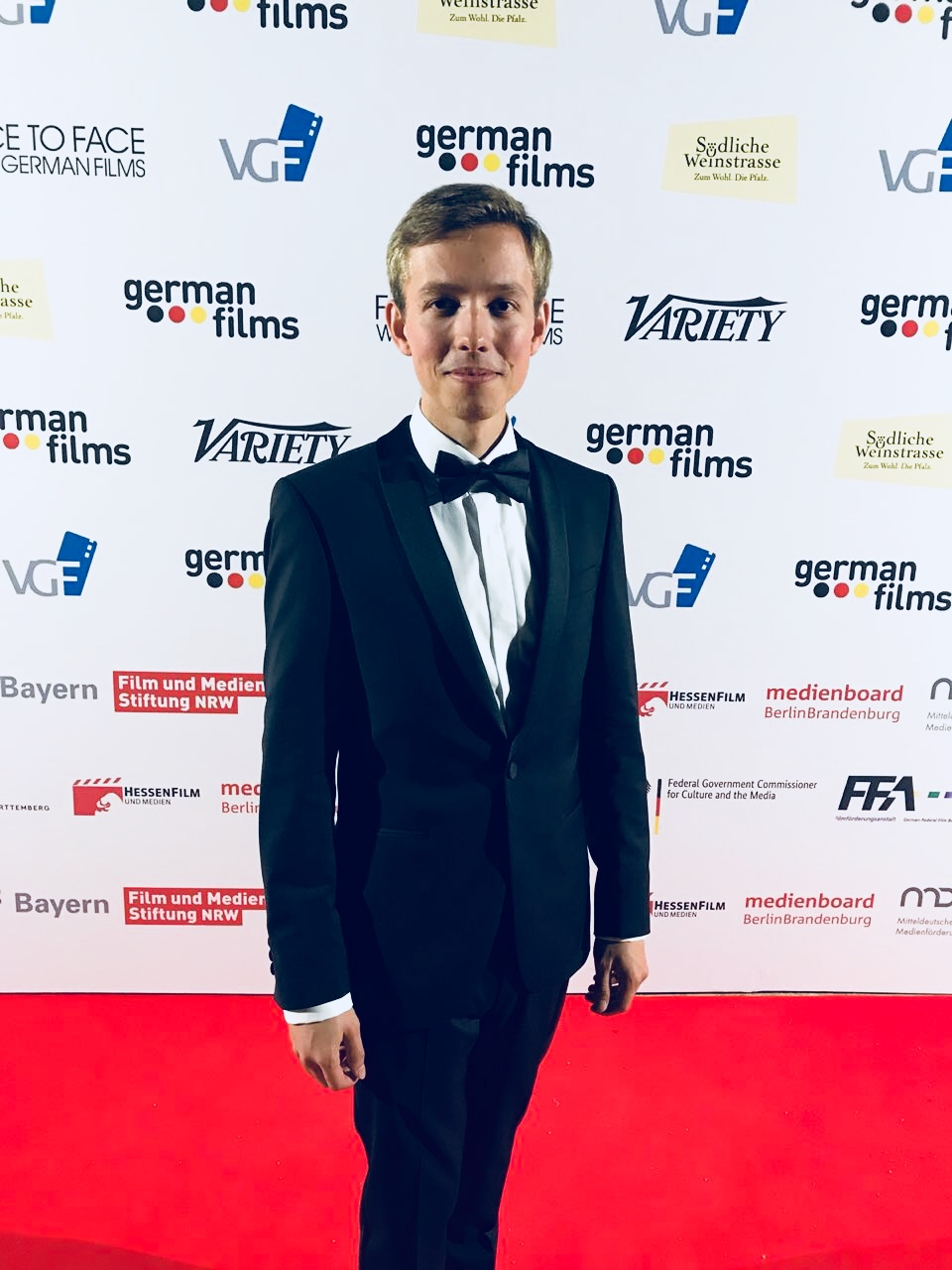 Leonard Küßner bei den internationalen Filmfestspielen von Cannes 2018